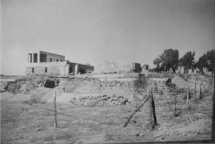 הר התקווה, 1933